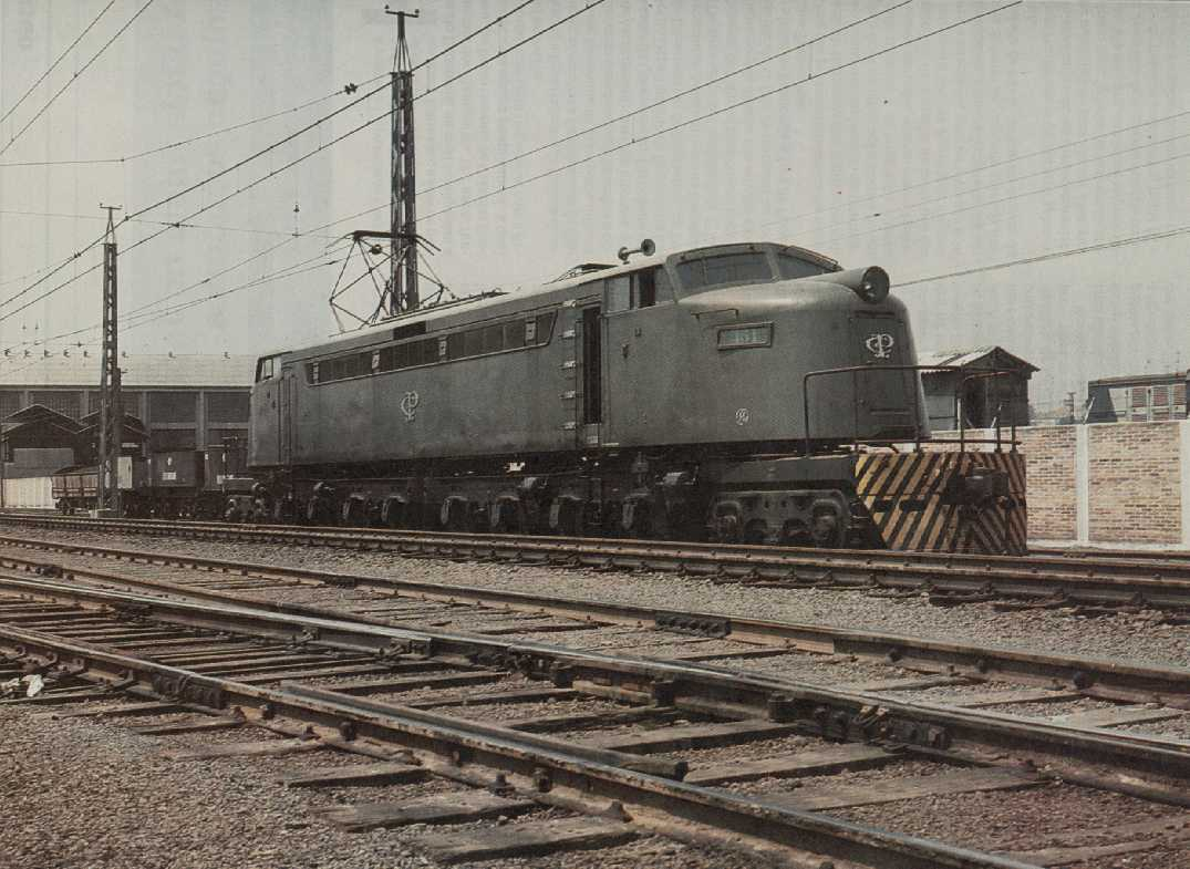 A imponente e poderosa GE Russa # 451 da Cia. Paulista